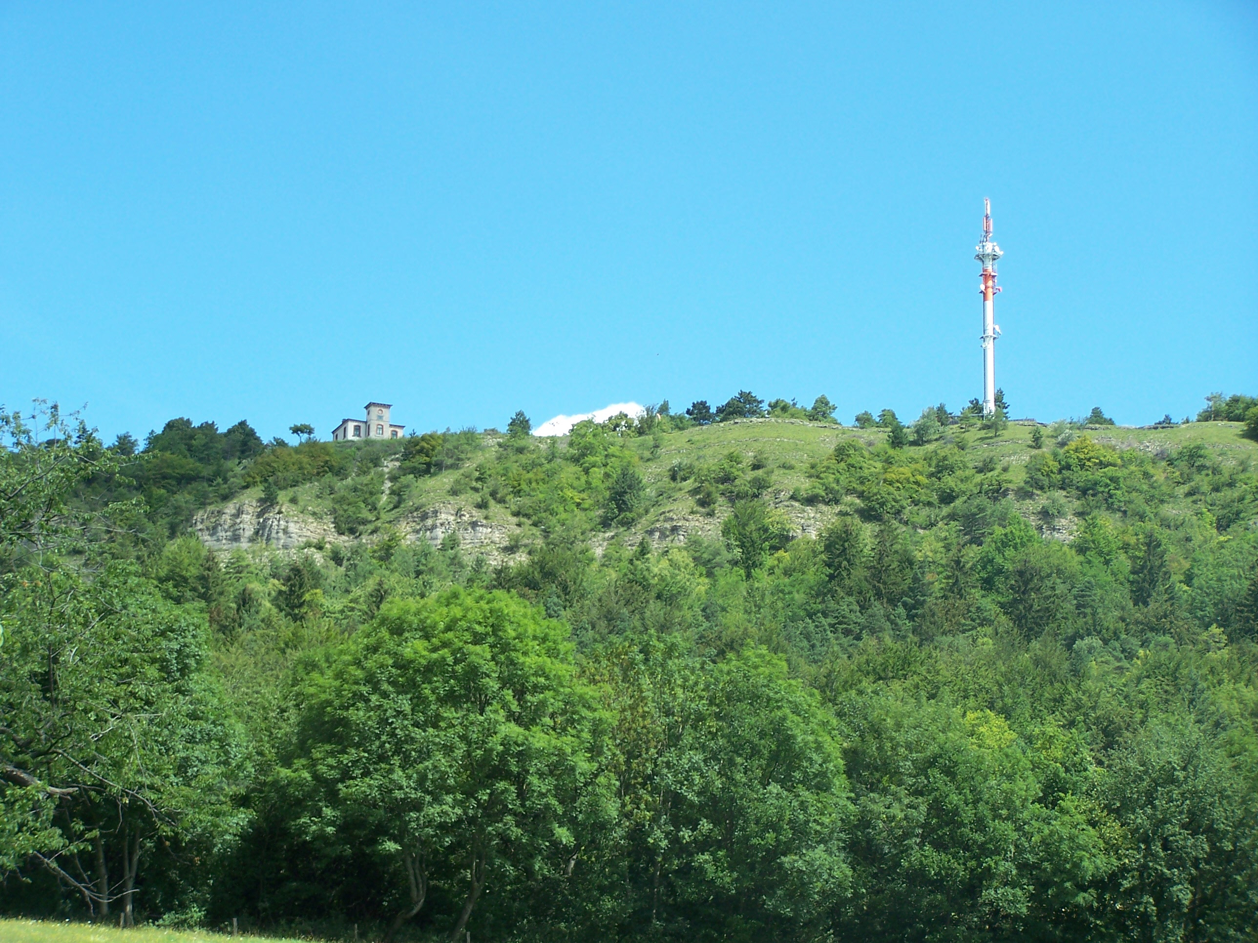 Blick vom Kälberfelder Rain zum Gipfel des Großen Hörselberges.